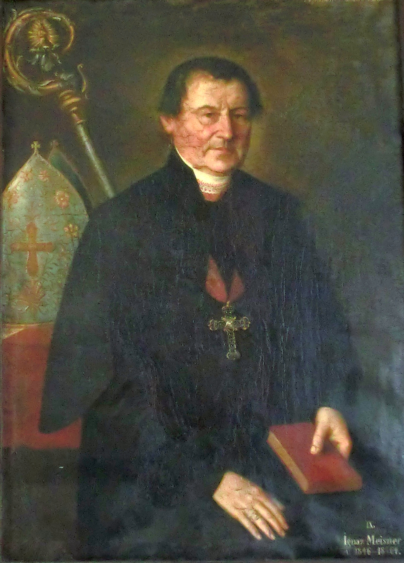 Hornopolický arciděkan Ignác Meisner.